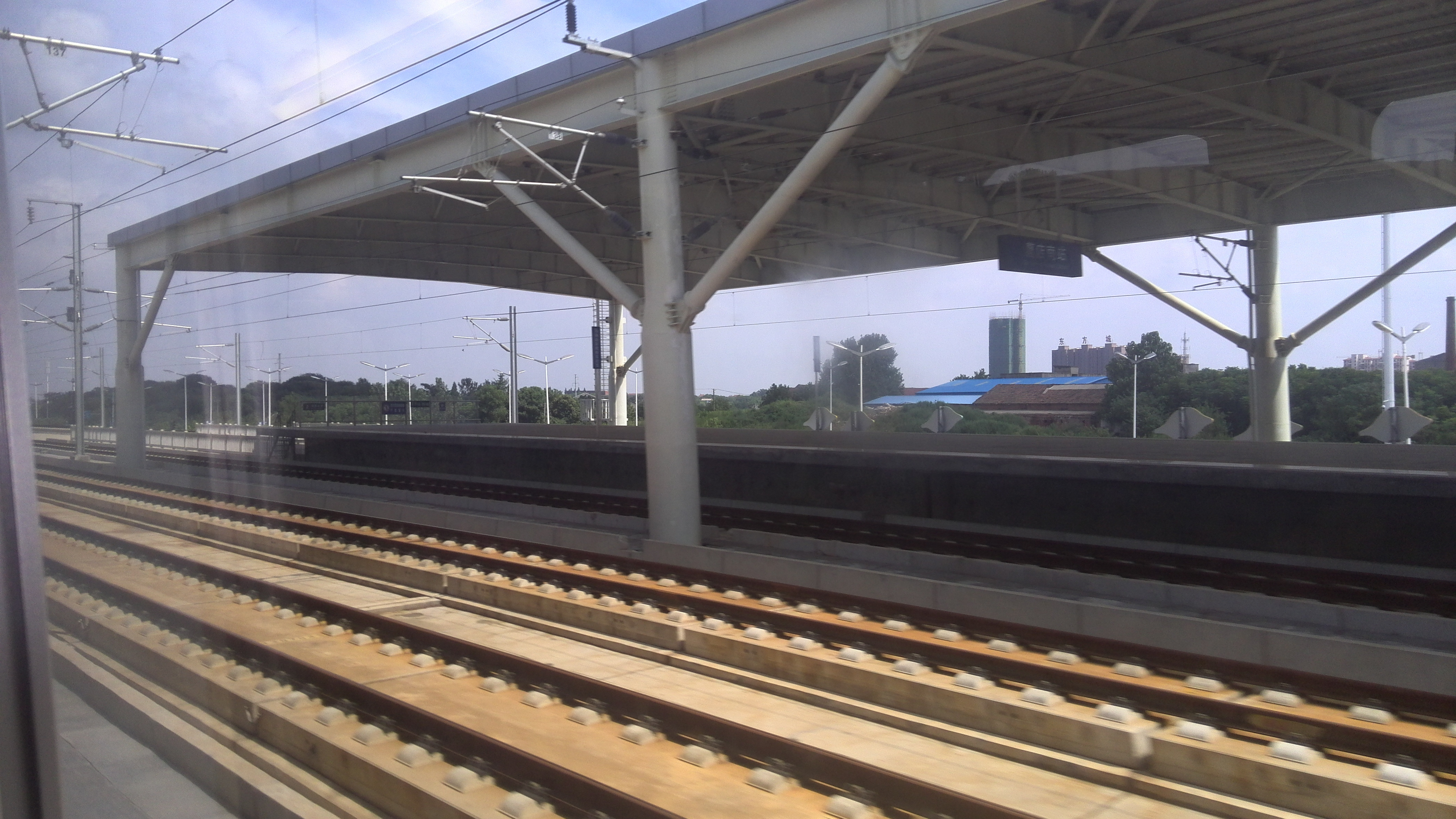 葛店南火车站